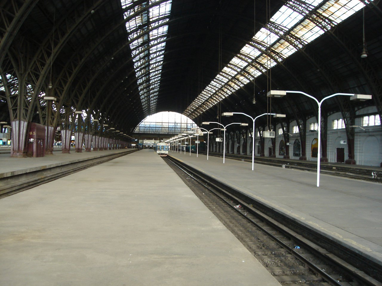 Vista de una de las naves de la estación Retiro Mitre desde la plataforma 6.